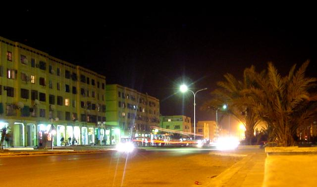 Biskra downtown, in Algeria